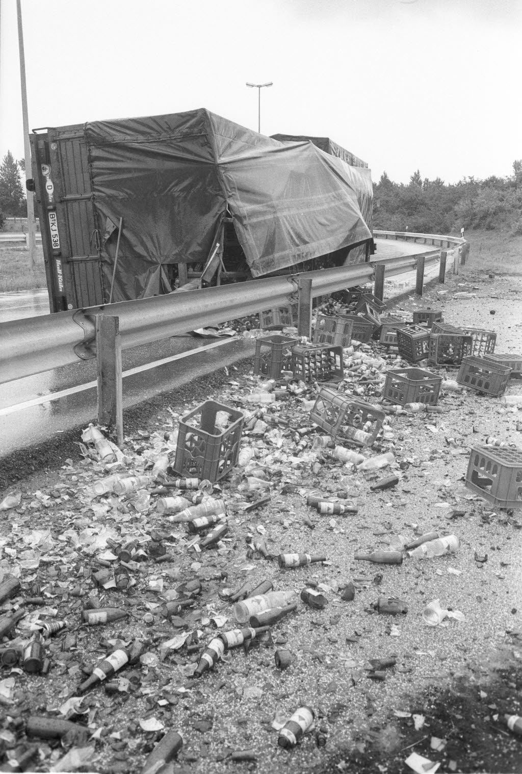 Ein Lastkraftwagen mit Getränkekästen ist am Holsteinplatz ins Schleudern geraten und umgekippt. Durch den Regen waren die Straßen nach wochenlanger Trockenheit sehr rutschig und schmierig.